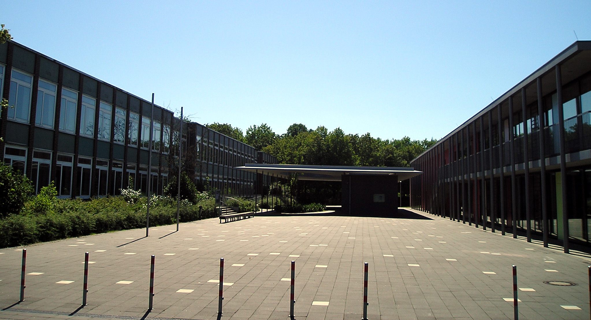 Gymnasium an der Koblenzer Straße, Düsseldorf-Urdenbach, Website